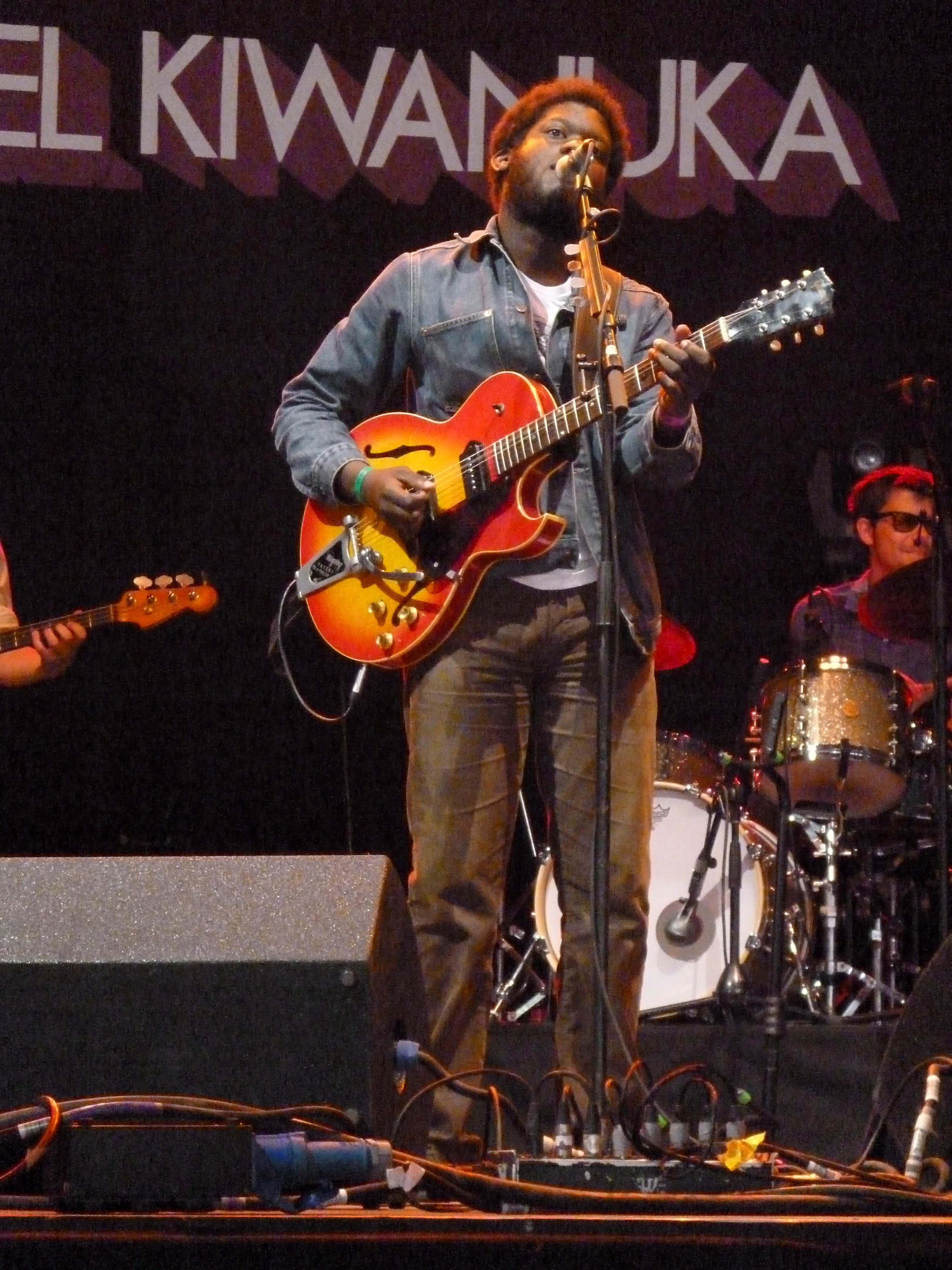 Michael Kiwanuka at Rock Werchter 2012